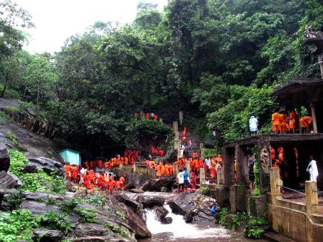 Hinduistický chrám ve státě Urísa, Indie